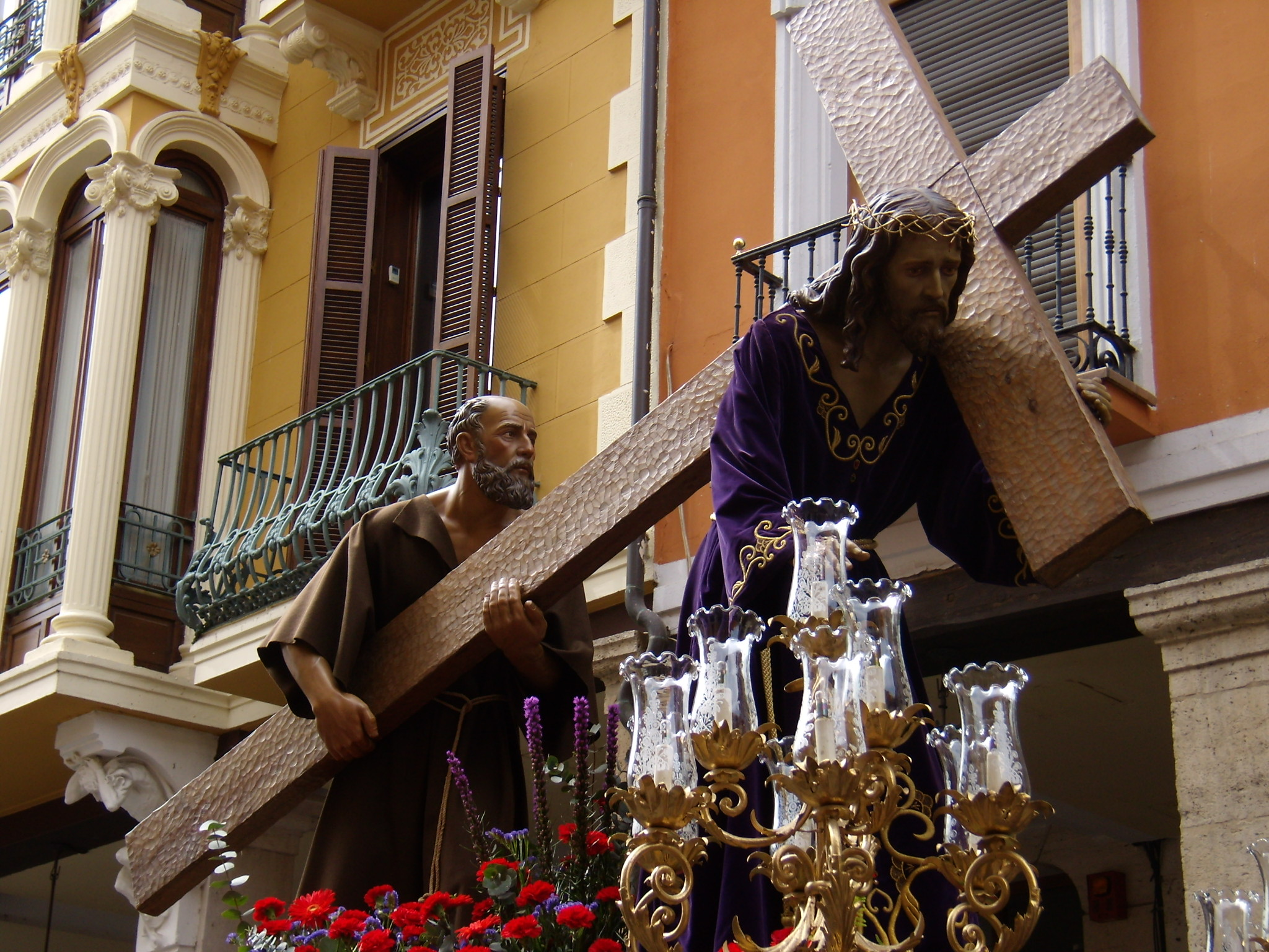 Jesús Nazareno con el Cirineo. Semana Santa de Palencia.